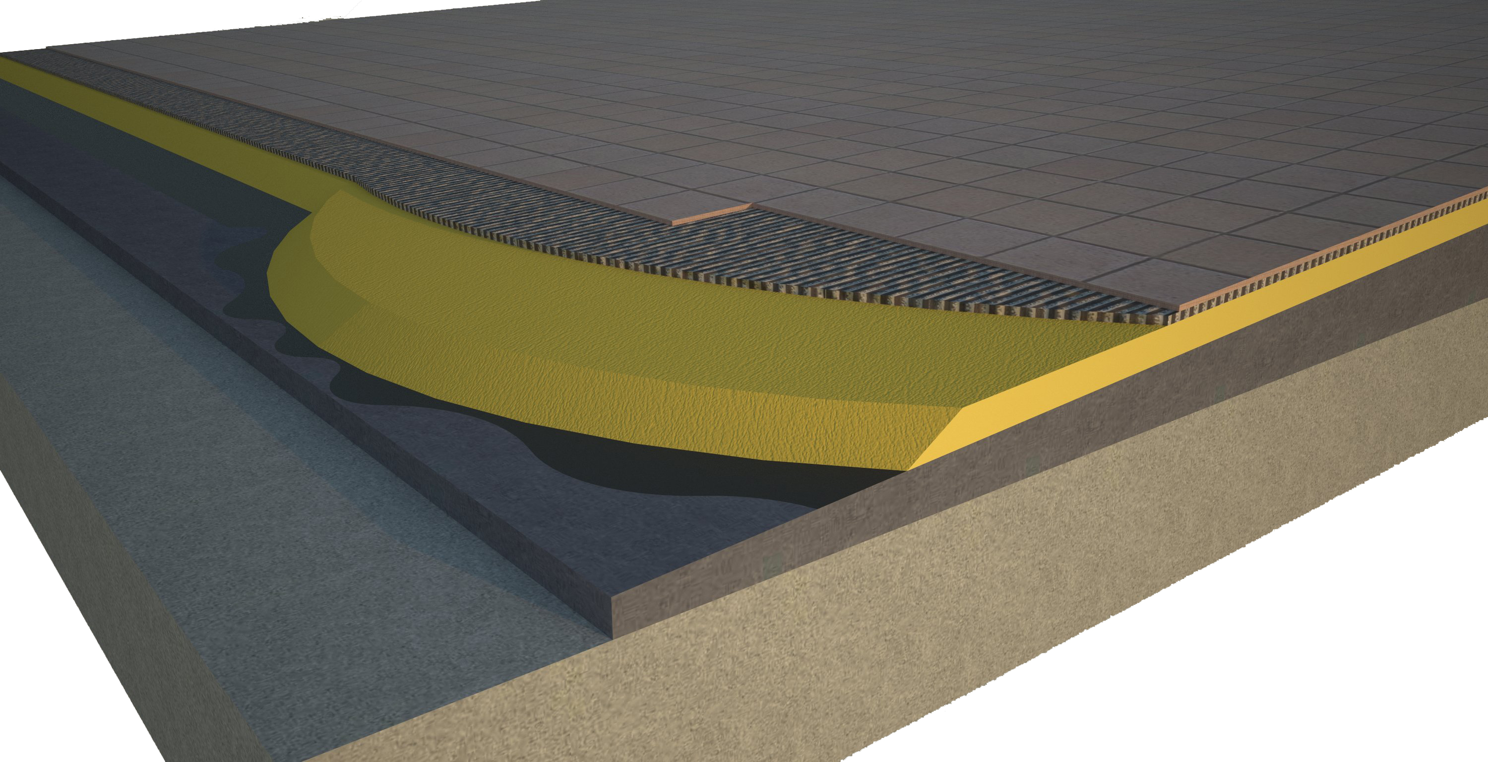 Poliuretano Proyectado. Cubierta Plana Transitable